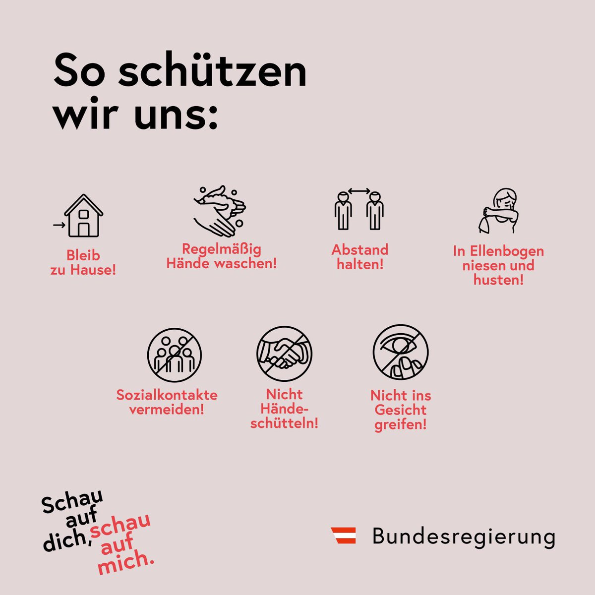 Grafik der österreichischen Bundesregierung in der Corona Krise